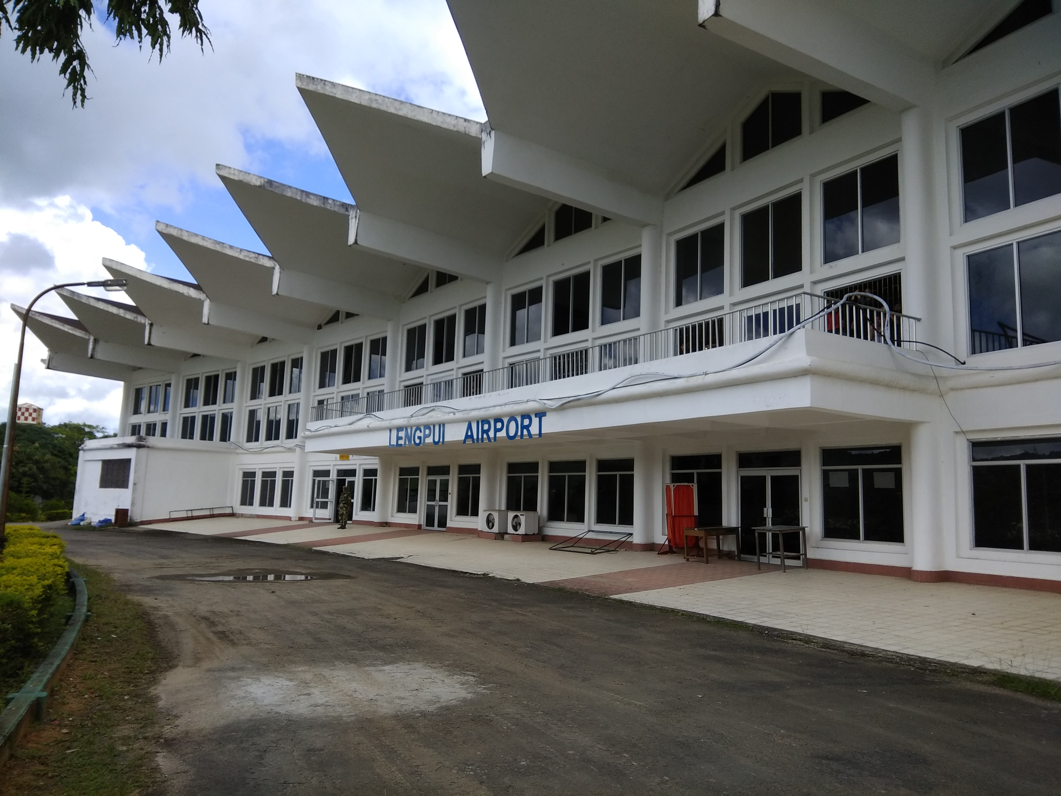 Lengpui airport, Mizoram, India